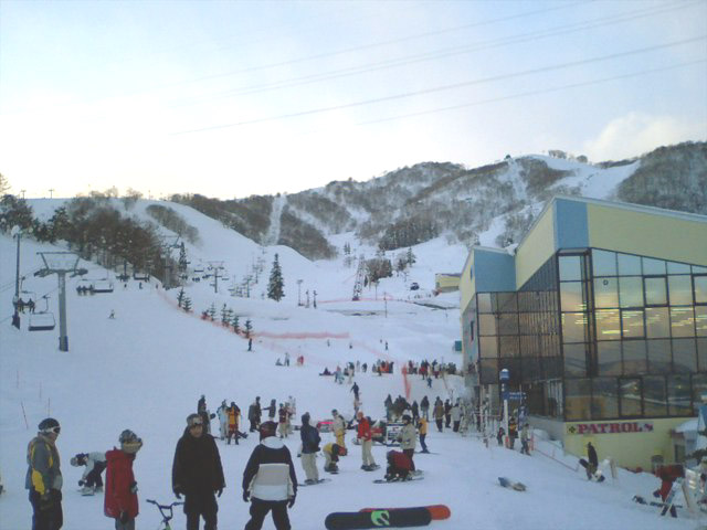 Dynaland Ski Area, Japan.